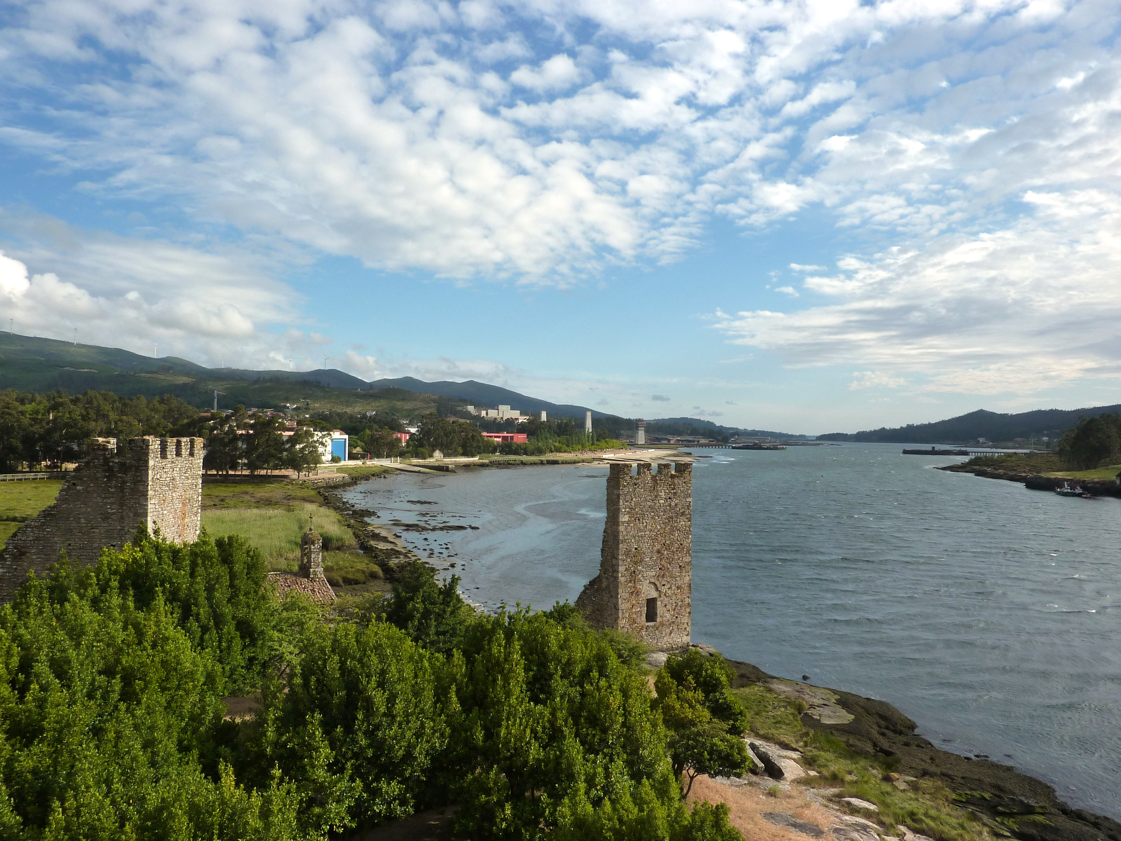 Torres de Oeste, Catoira